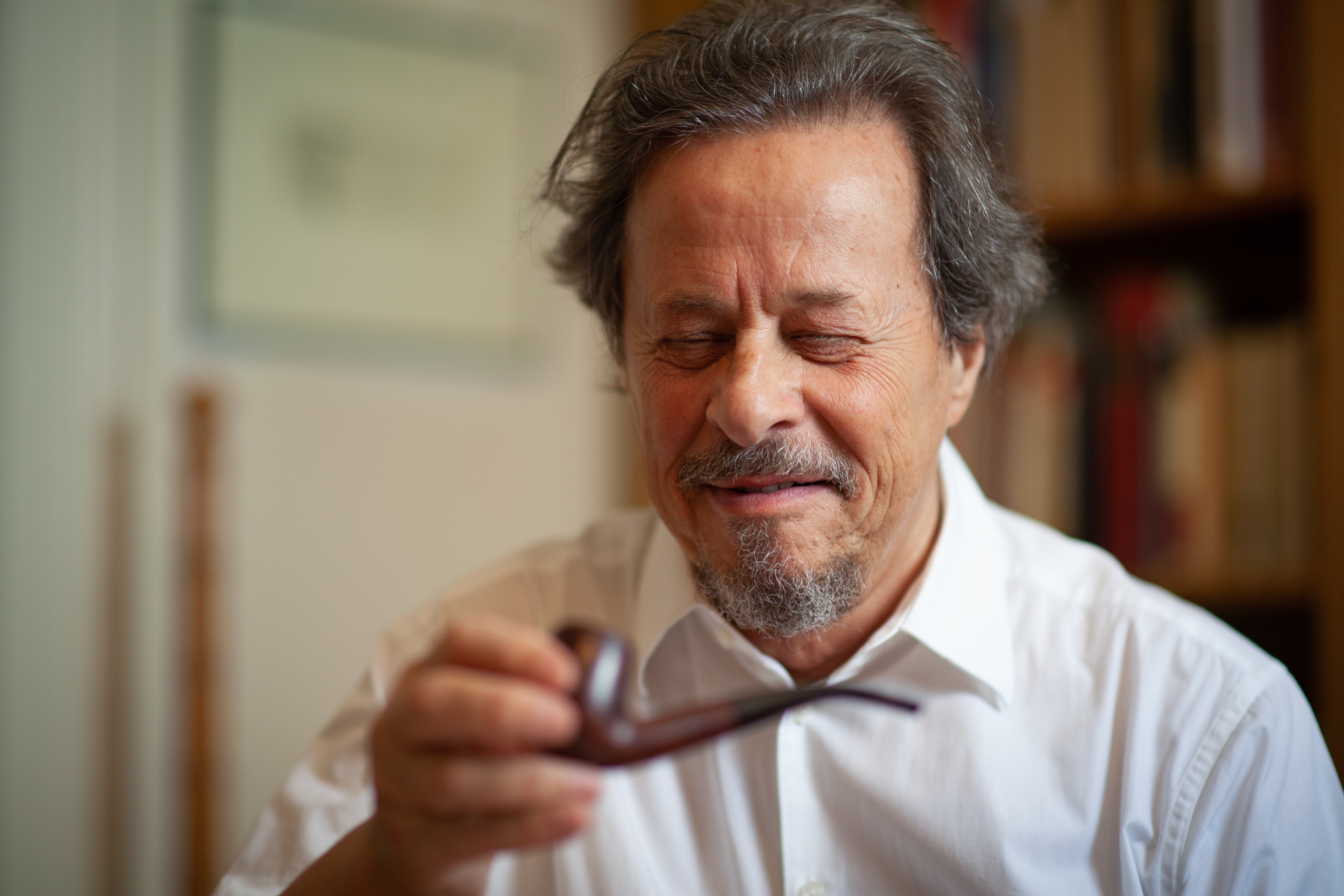 Erőd Iván zeneszerző, zongorista 2011 júniusában